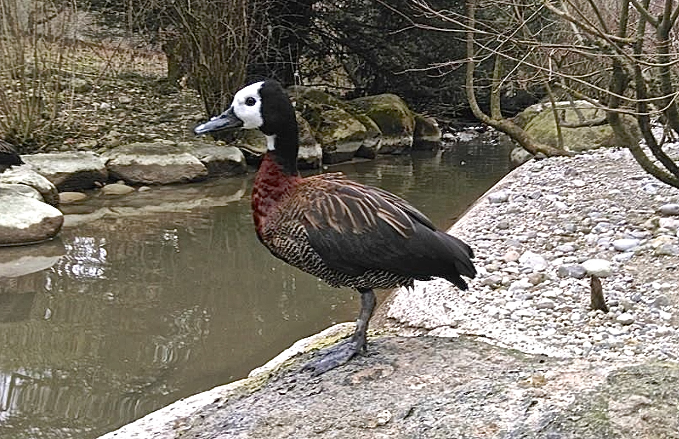 Witwenpfeifgans Tierpark München